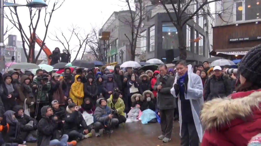 홍대입구 앞 거리 집회에서 연설하는 문재인과 표창원